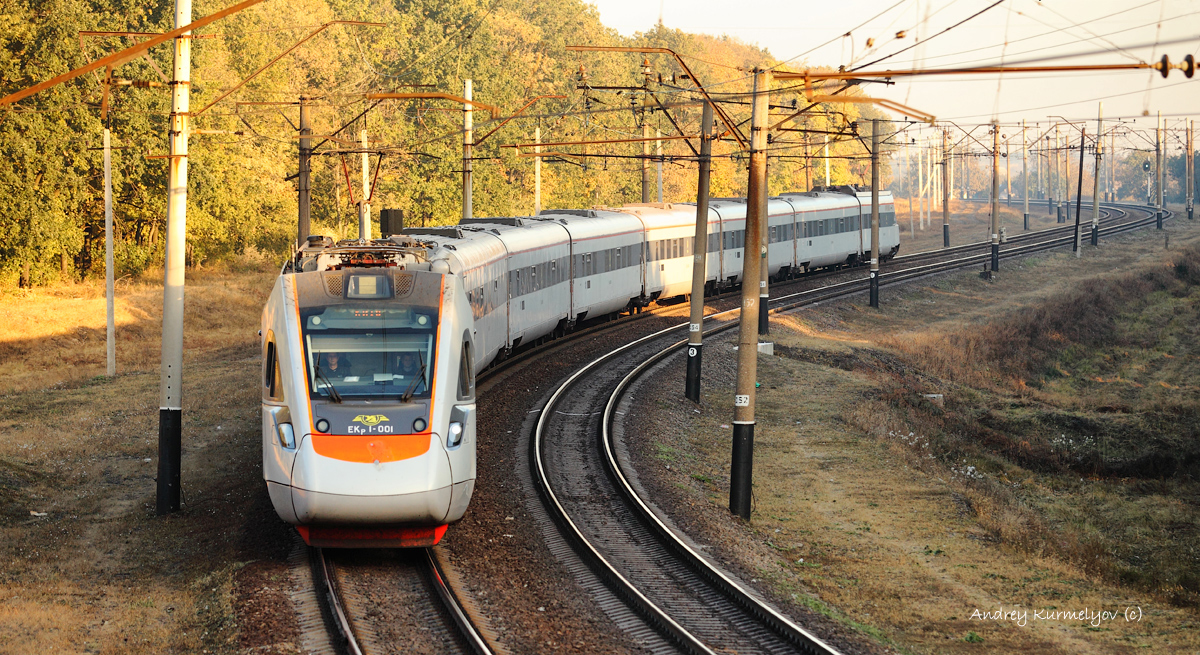 Электропоезд ЭКр1-001.Украина, Днепропетровская область, перегон Илларионово - Игрень